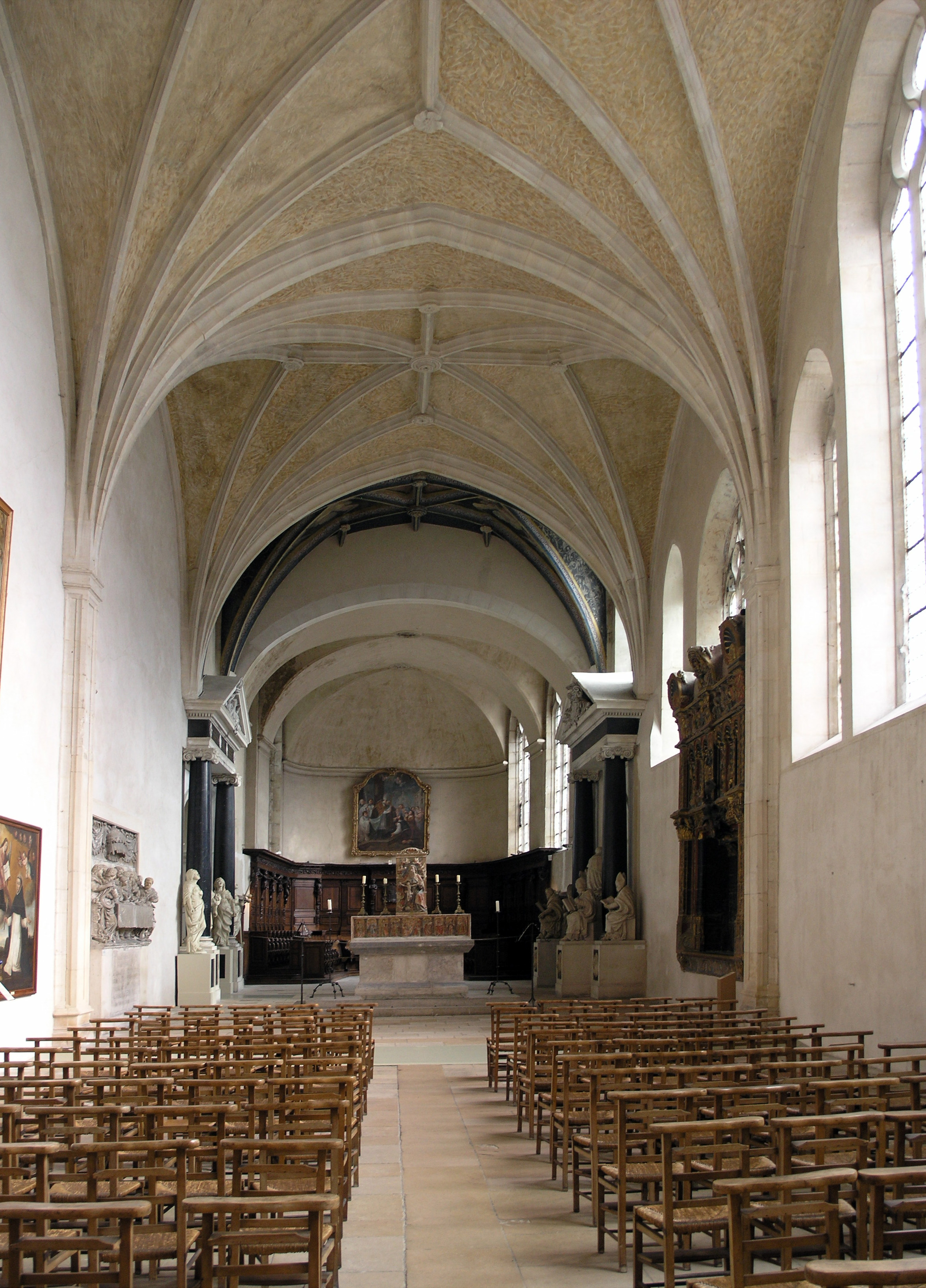 Vue intérieure, vers l'autel, de l'église des Cordeliers, consacrée en 1487 par René II de Lorraine en accomplissement d'un vœu fait avant sa victoire sur Charles le Téméraire, Nancy. Photograph taken by Marsyas 15:05, 26 February 2006 (UTC)